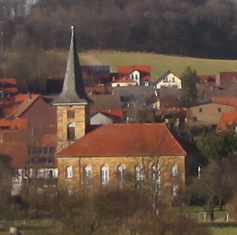 Gielde, ev.-luth. Kirche